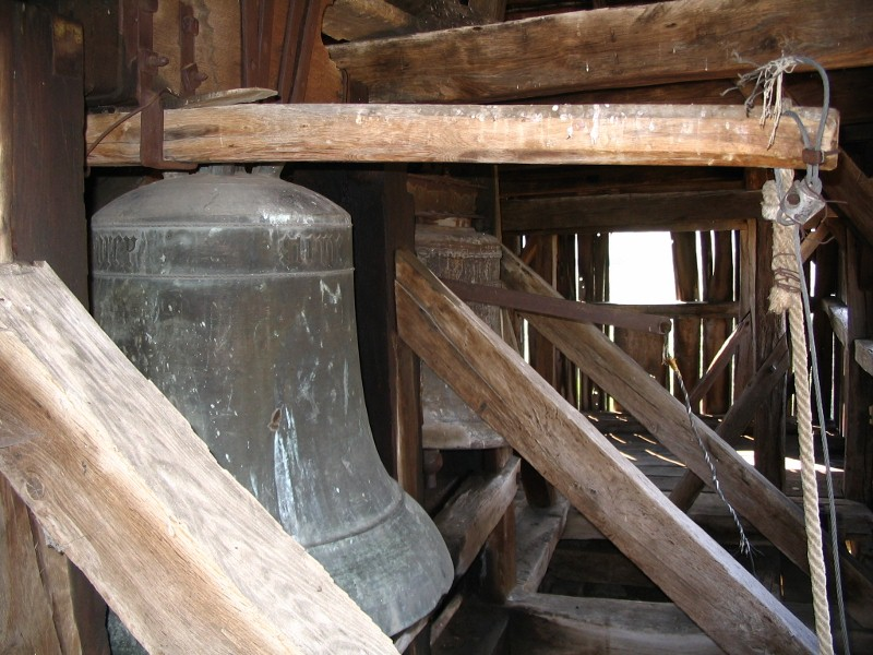 Glocken der Kirchenburg Bekokten